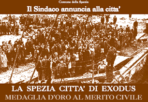 Manifesto della cerimonia di assegnazione della Medaglia d'oro al valor civile, alla città della Spezia